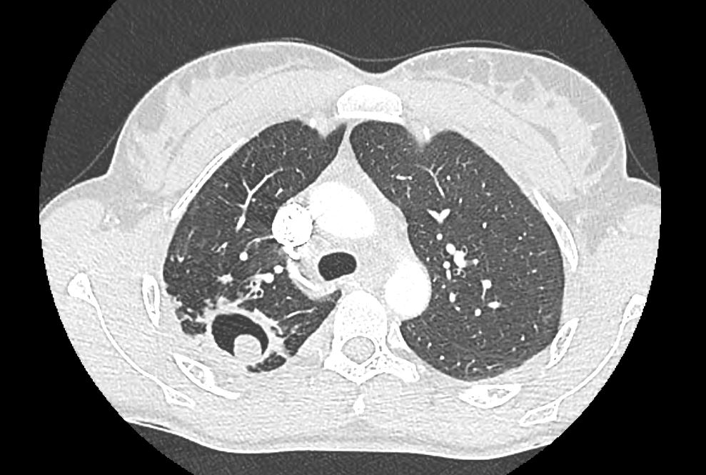 Aspergillome développé au sein d'une caverne tuberculeuse du lobe supérieur droit chez une patiente VIH+.